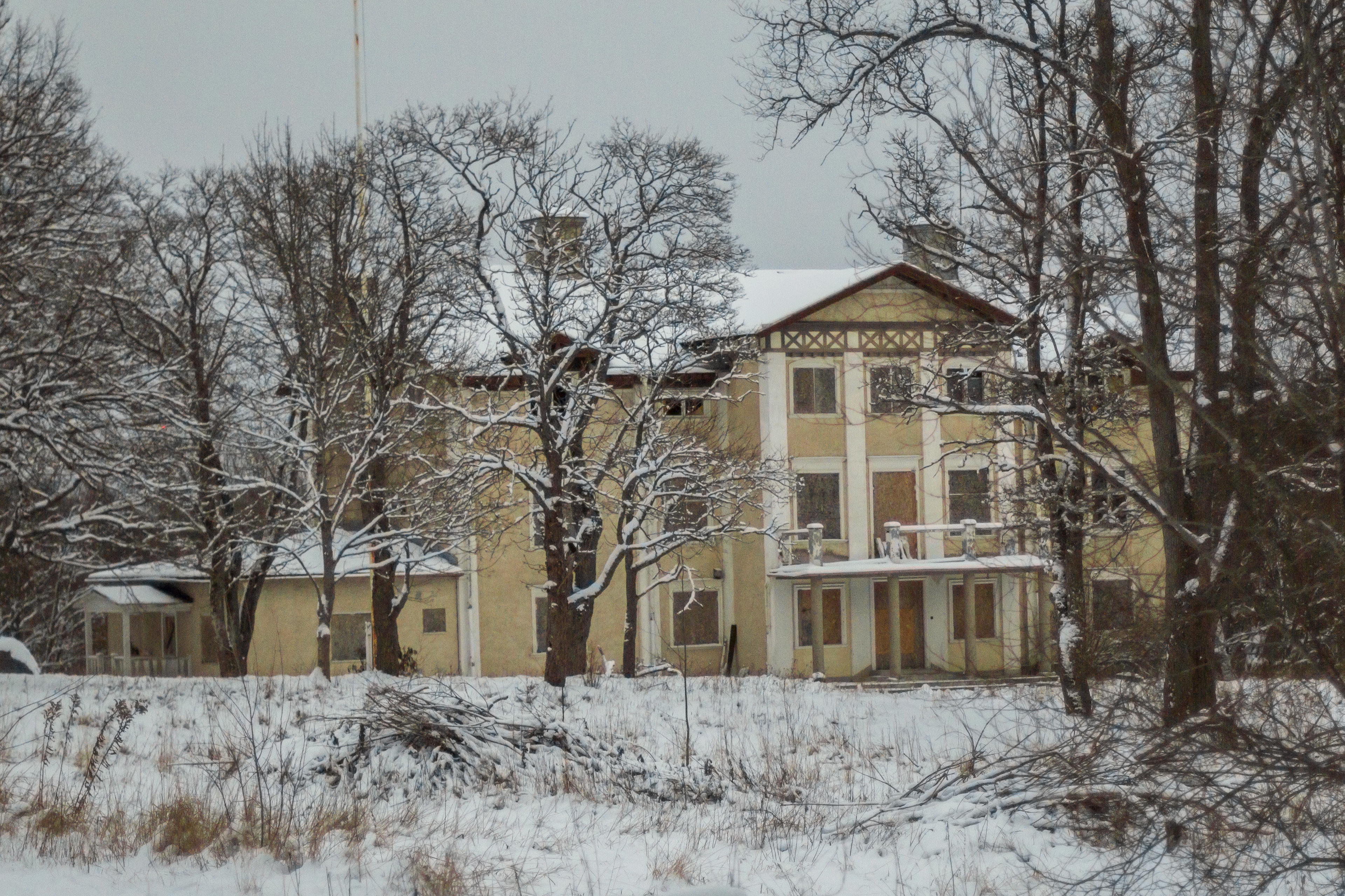 Rottneby herrgård, huvudbyggnaden. Falu kommun, Sverige.